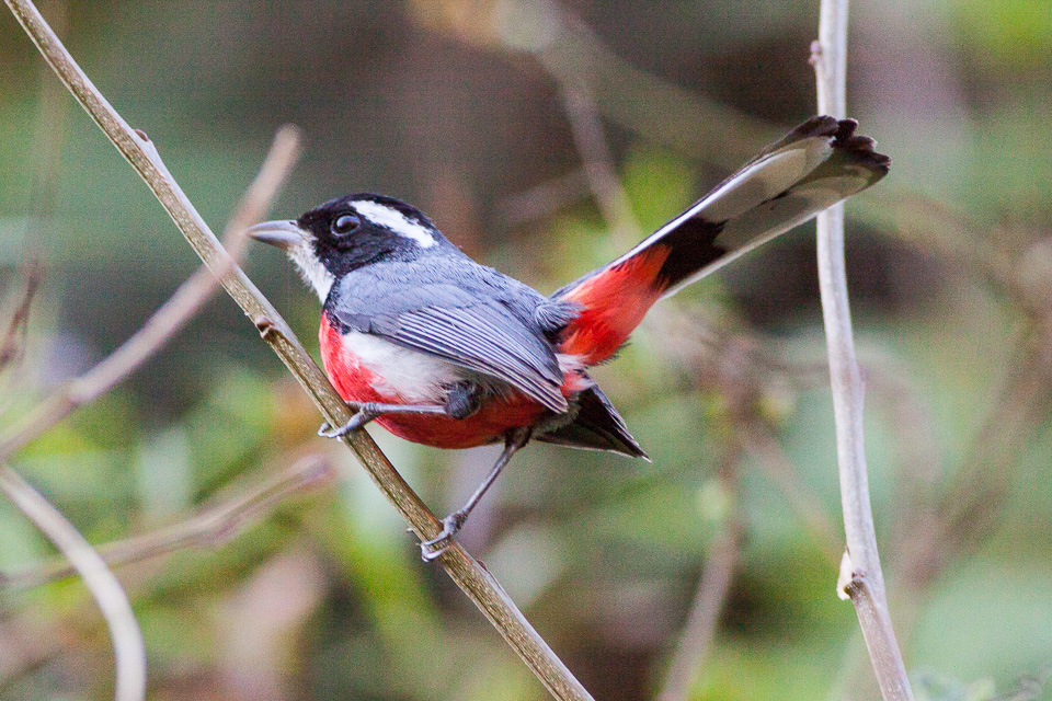 Playa de Oro Road, Colima